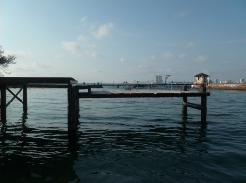 île des Sacrifices